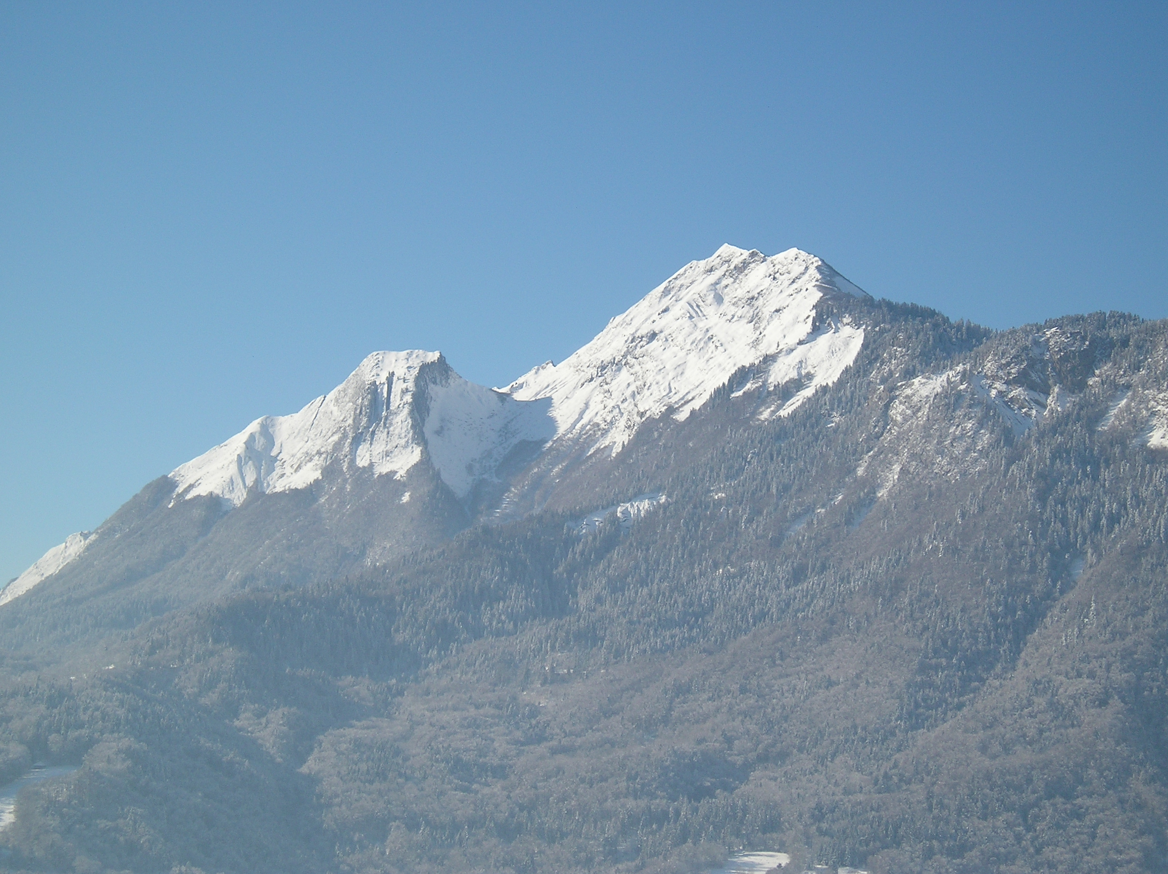 La Dent de Cons, en hiver, vue depuis le hameau du Mont Dessus.